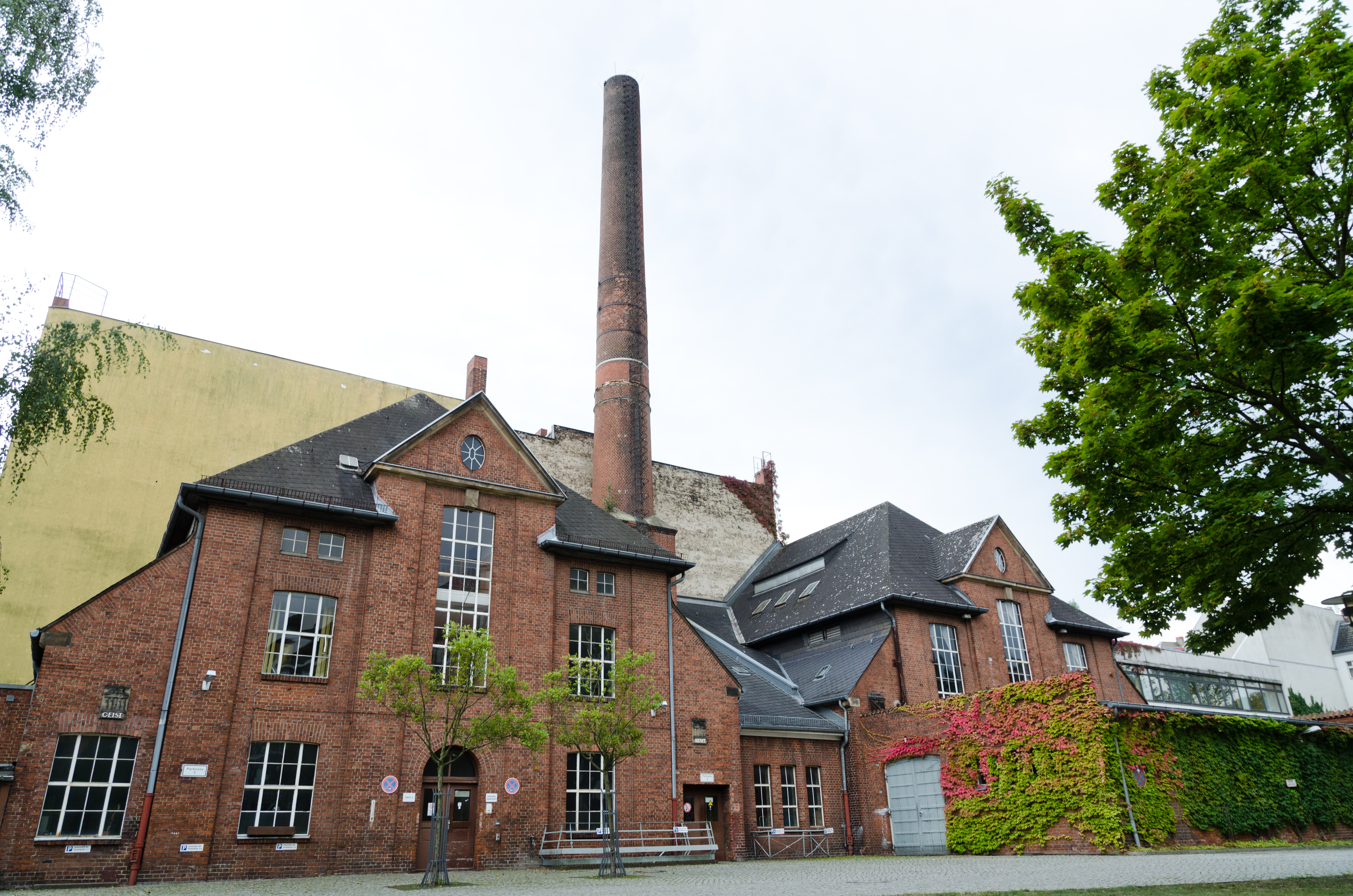 Reinickendorfer Straße 61–62, Kaiser- und Kaiserin-Friedrich-Kinderkrankenhaus, Kessel- und Werkstättenhaus, 1911–13 von Heino Schmieden und Julius BoethkThis is a photograph of an architectural monument.